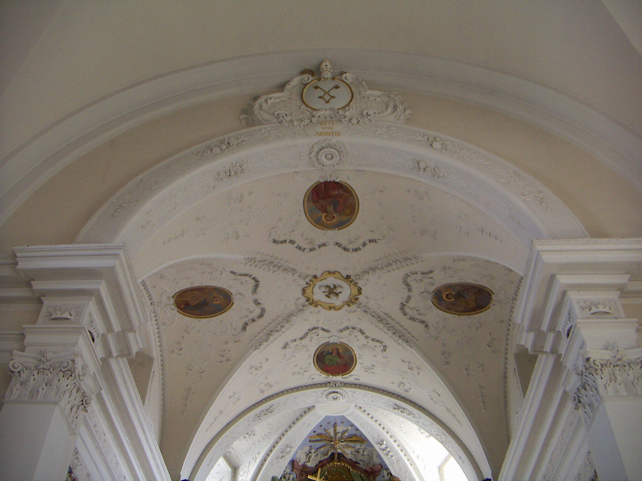 Pfarrkirche Ravelsbach, Wappen vom Stift Melk mit dem Motto des Benediktinerordens